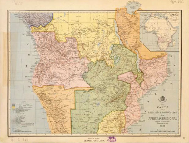 Carta das possessões portuguezas da Africa meridional : segundo as convenções celebradas em 1891